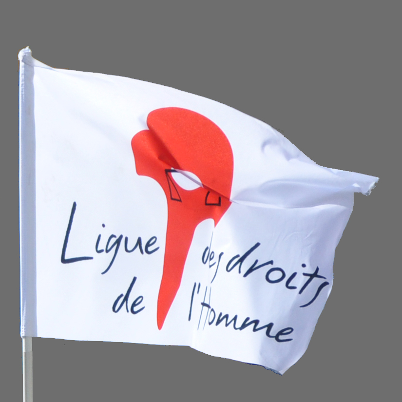 Sur le drapeau de la Ligue des Droits de l'Homme figure le bonnet phrygien.